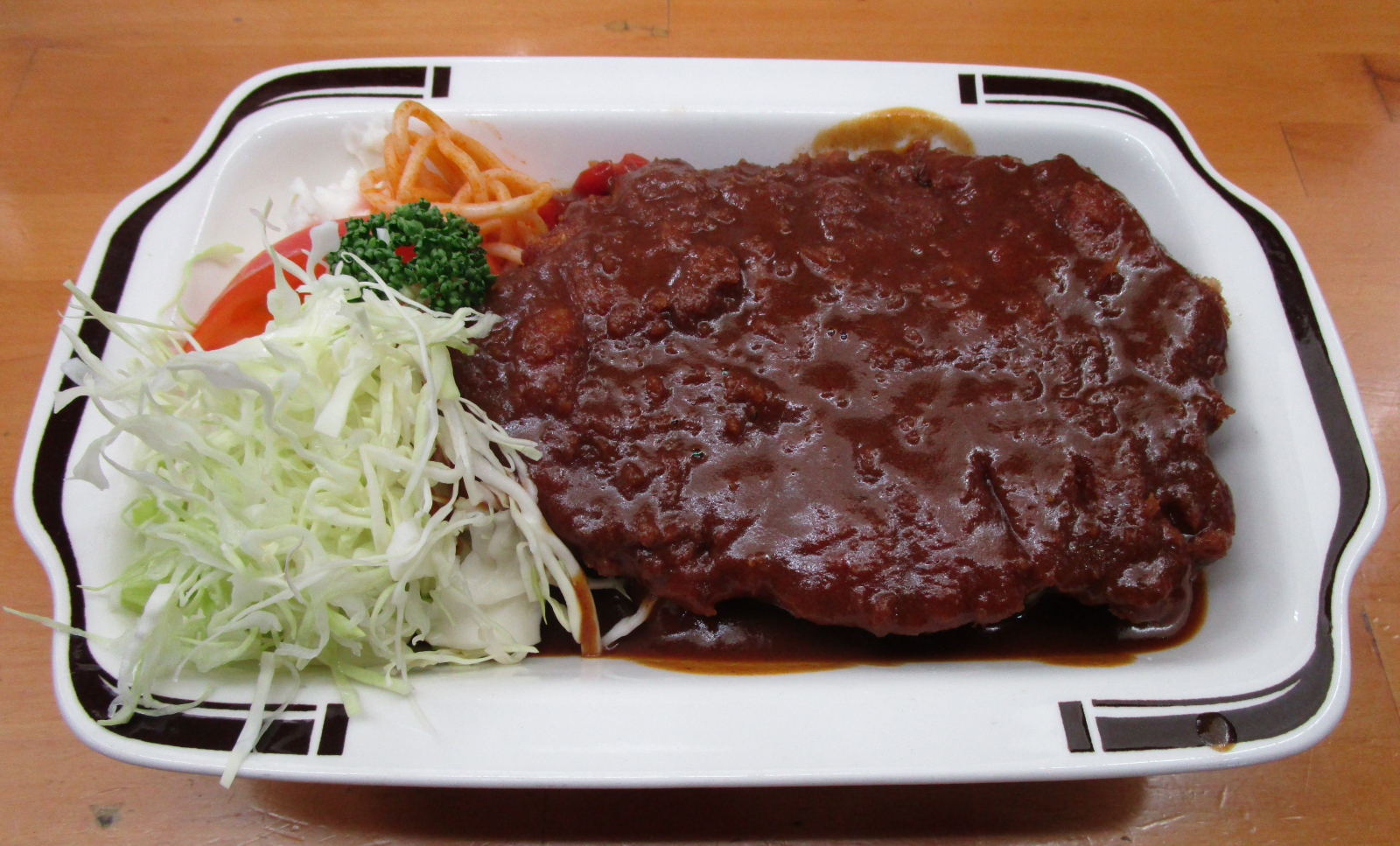 島根県松江市のカツライス（お食事処 ふのより撮影）